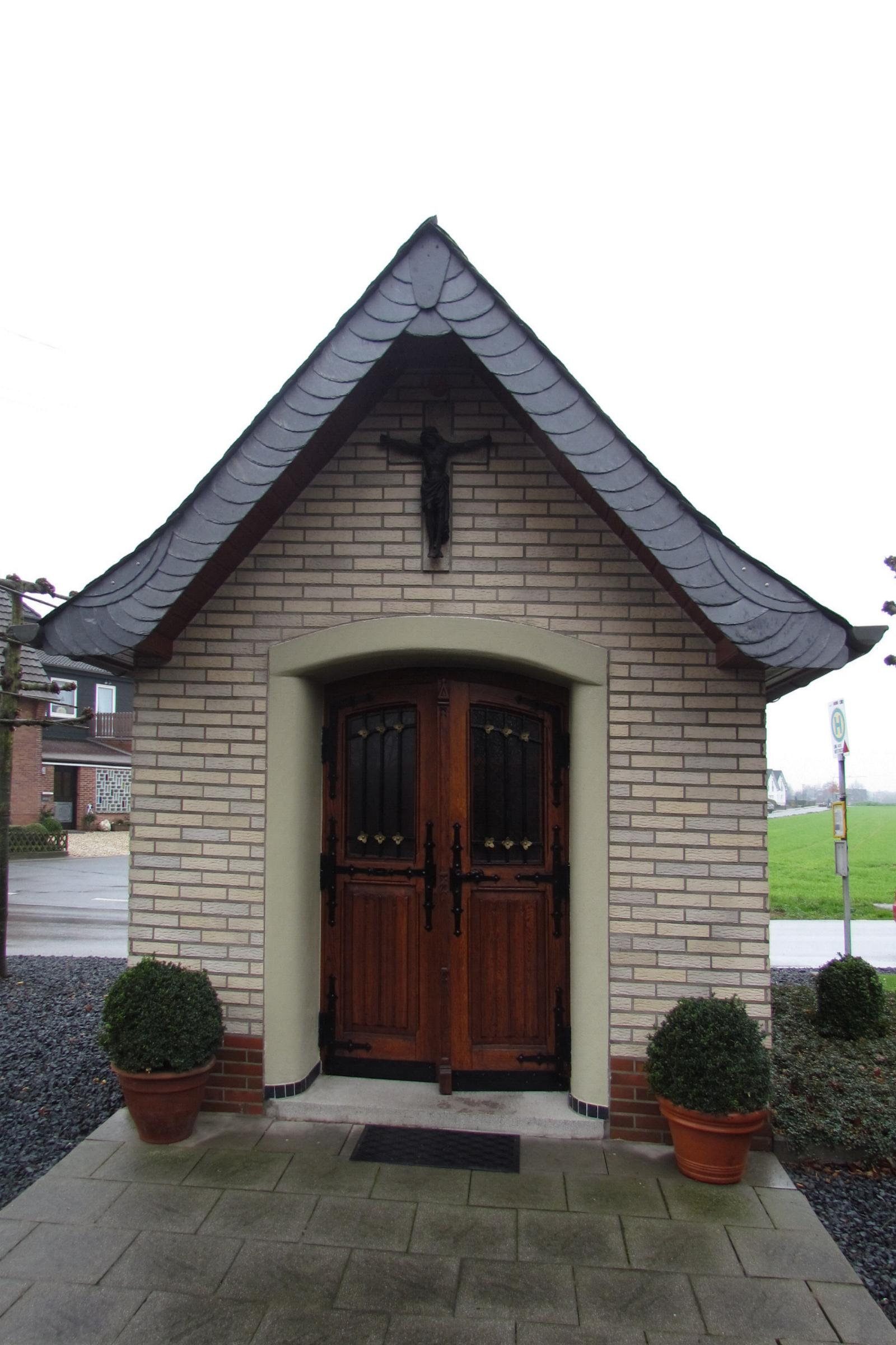 Kirchen, Kapellen in Heinsberg